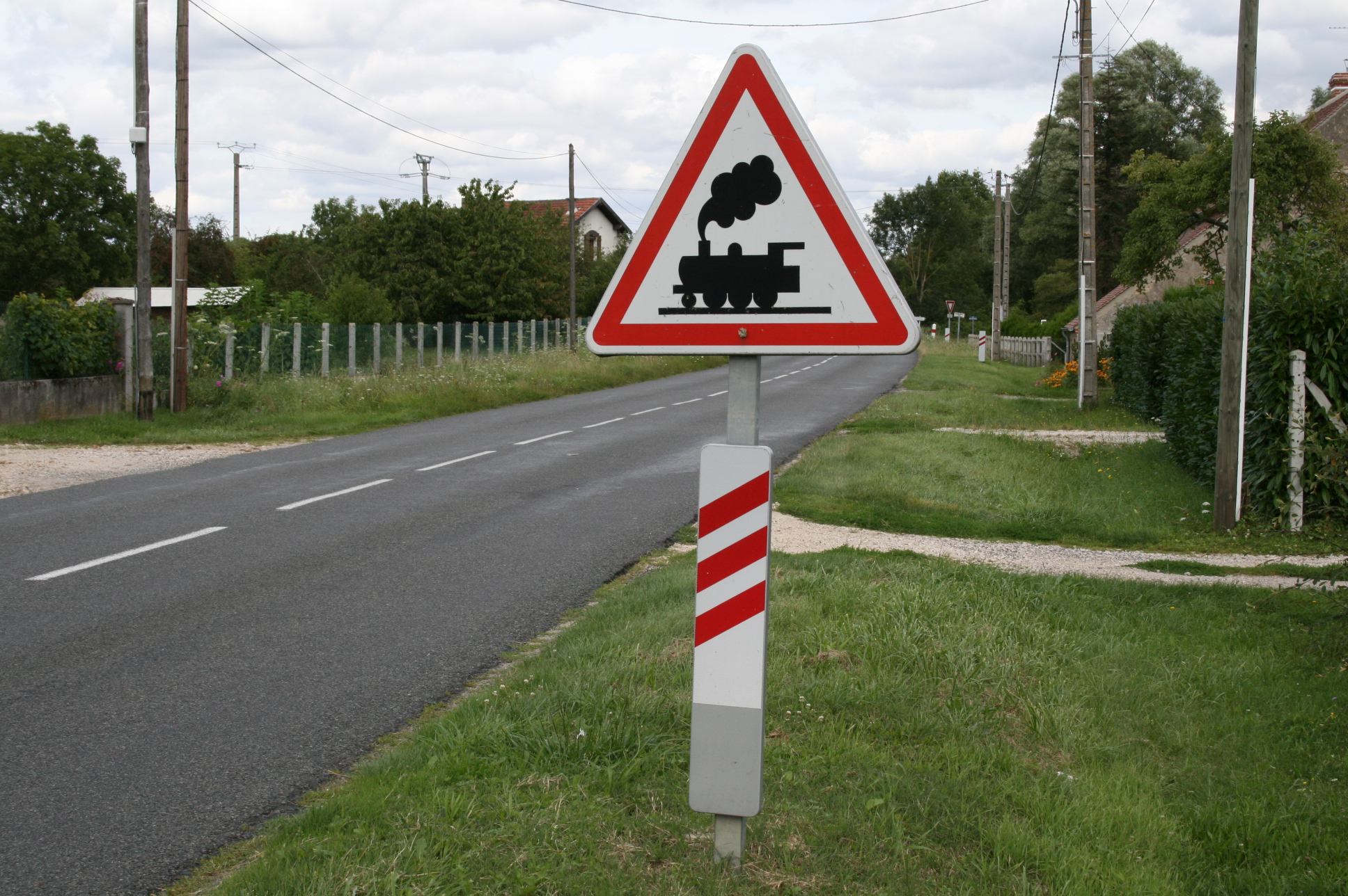 Panneau A8bis de signalisation de passage à niveau non gardé (France)